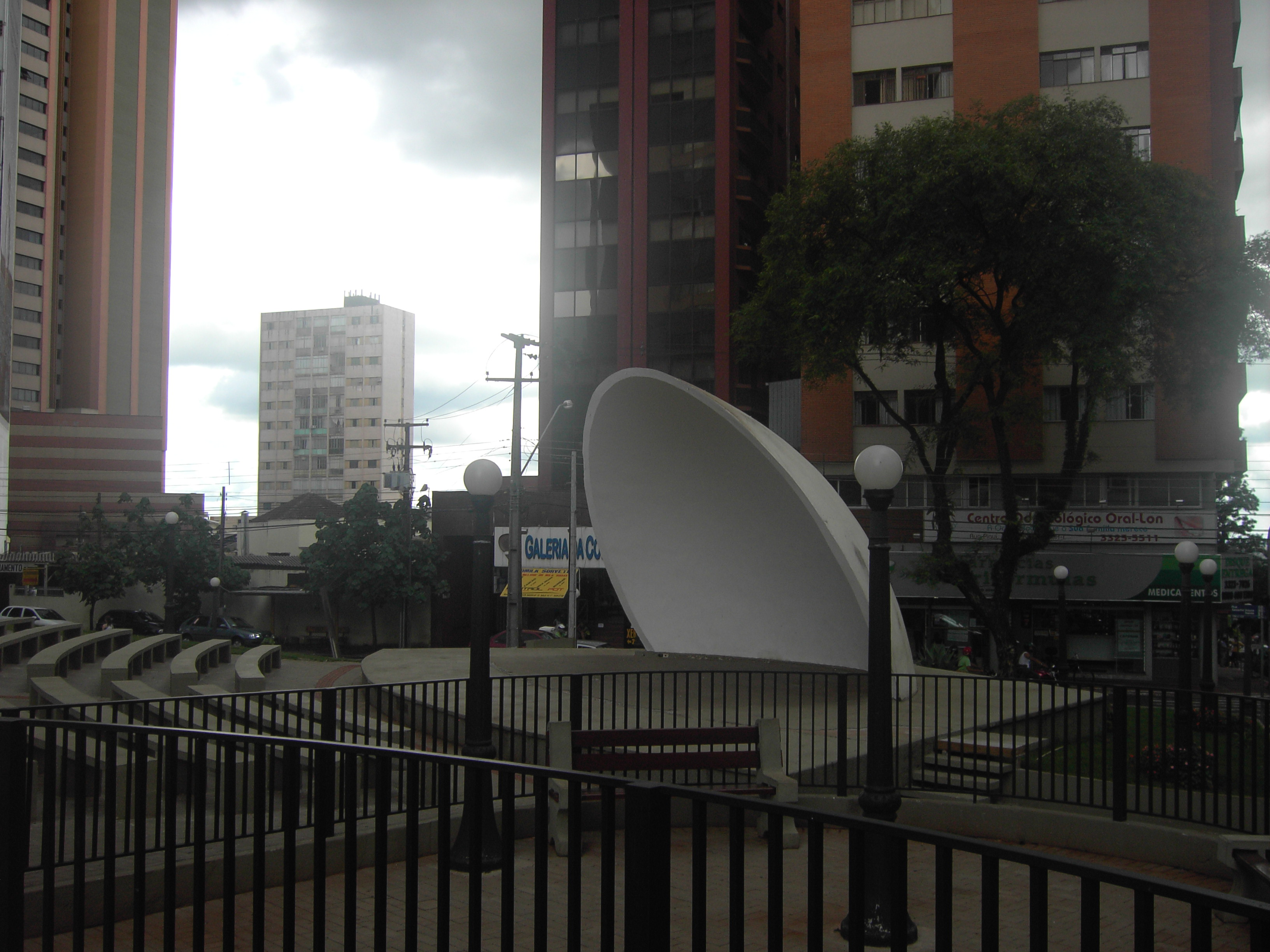 {Concha Acústica, Londrina-PR, Brasil}